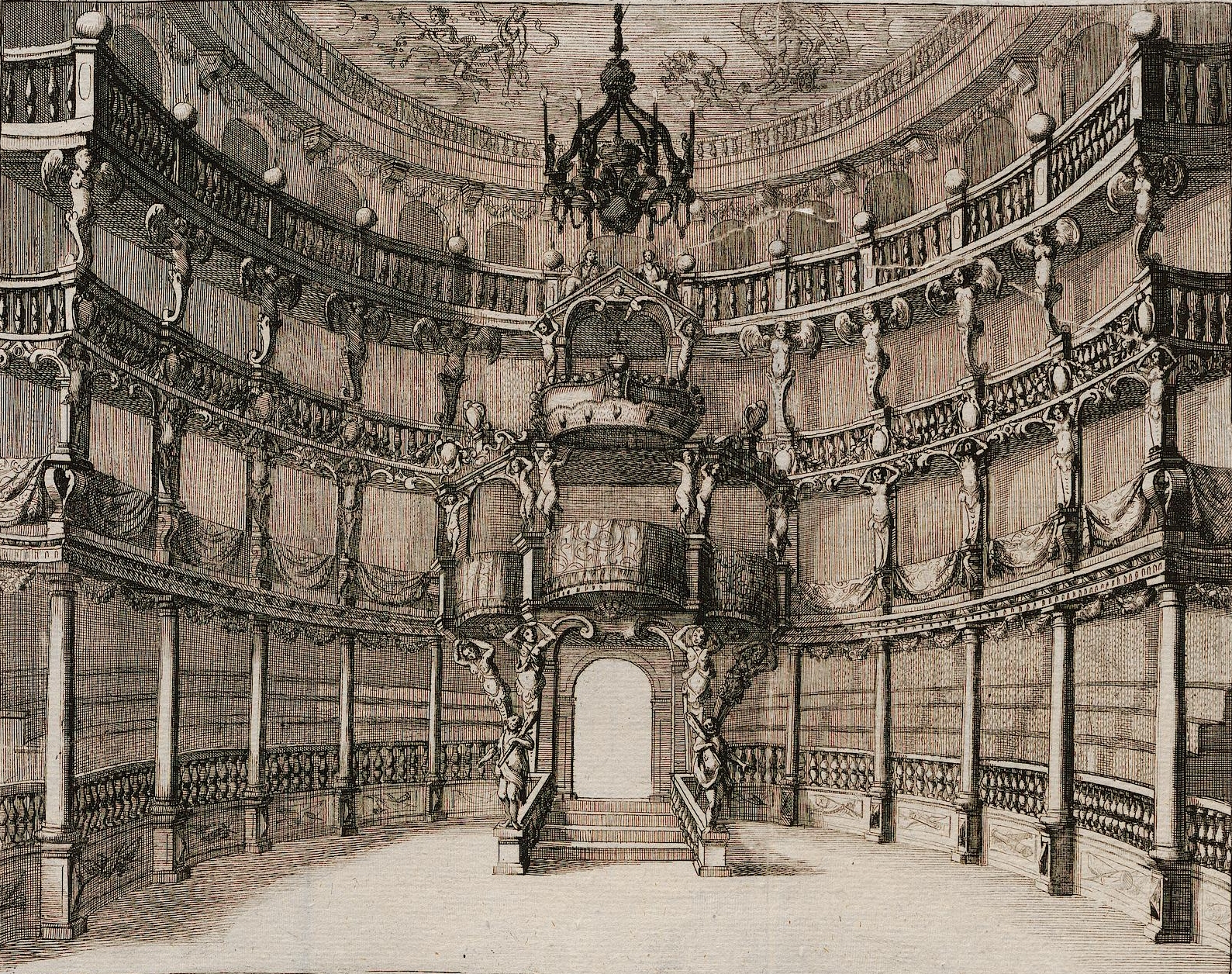 Grafik aus dem Klebeband Nr. 15 der Fürstlich Waldeckschen Hofbibliothek Arolsen Motiv: Opernhaus am Salvatorplatz in München